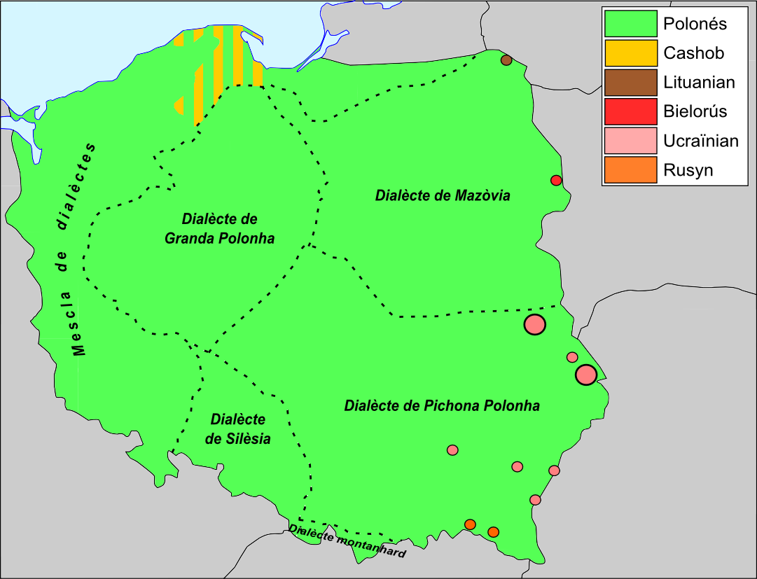 Esquèma lingüistic de Polonha.